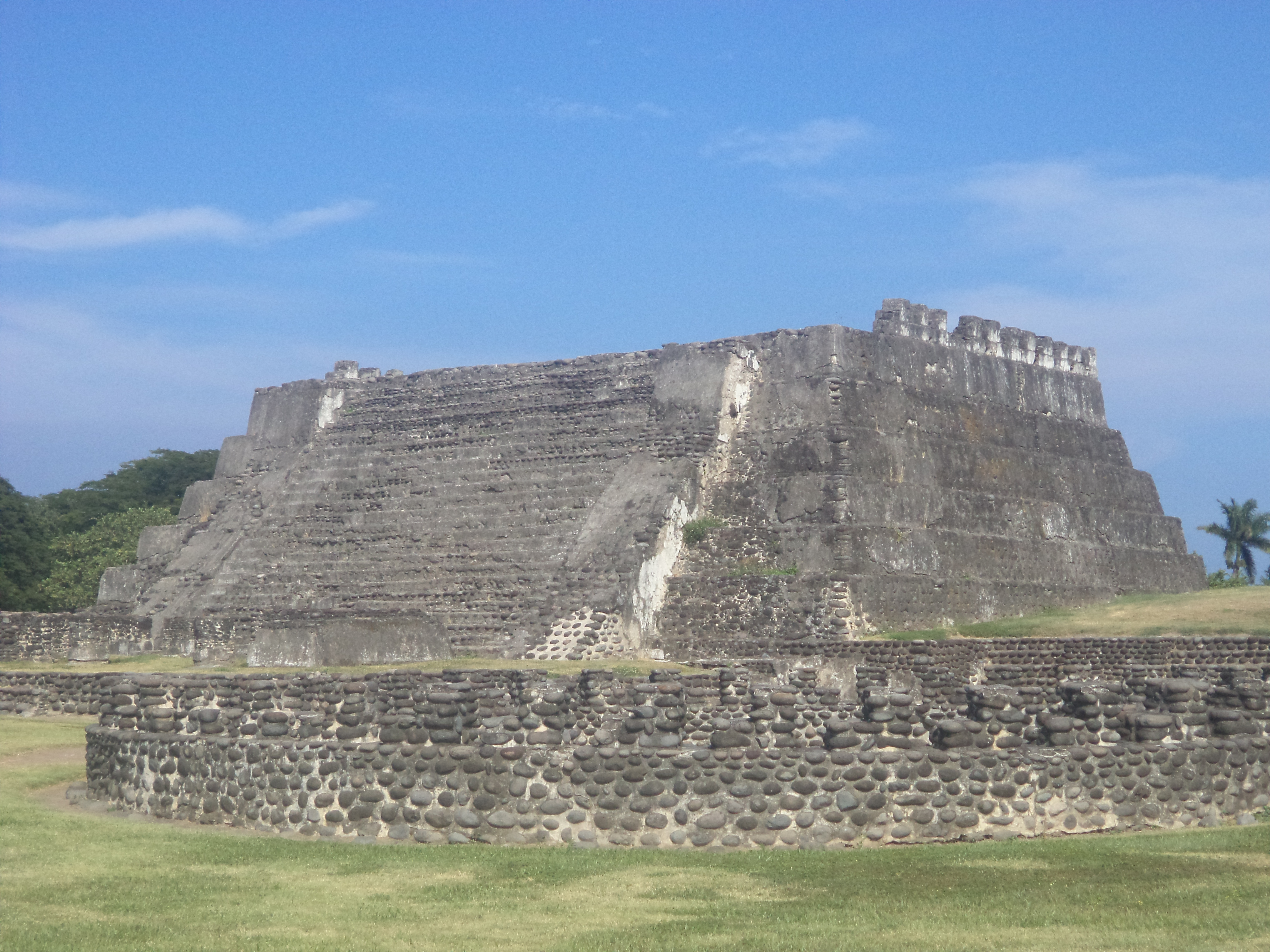 Cempoala